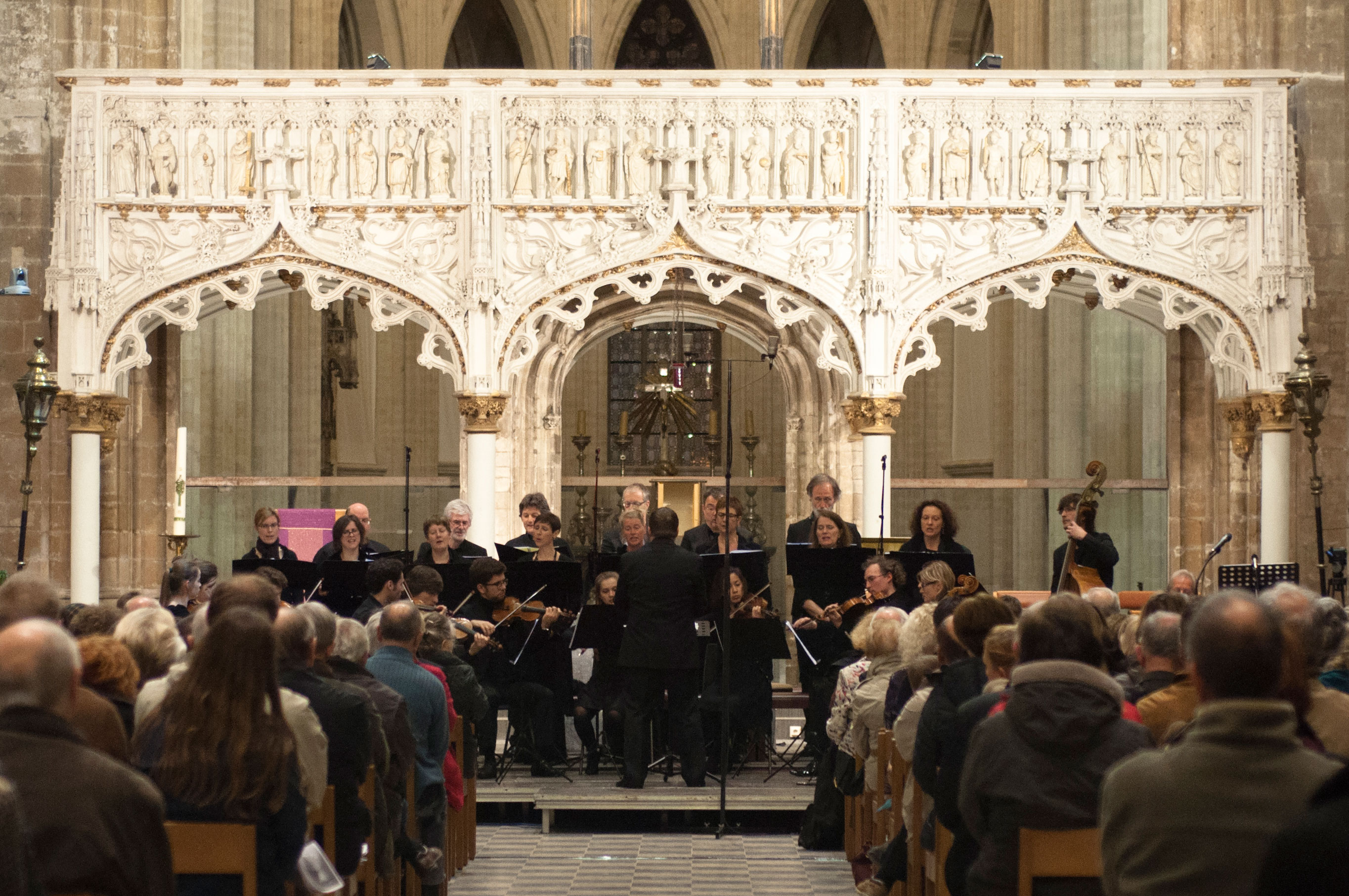 Liesbeth Vereertbrugghe met koor Frascati Vocal olv Kris Stroobants